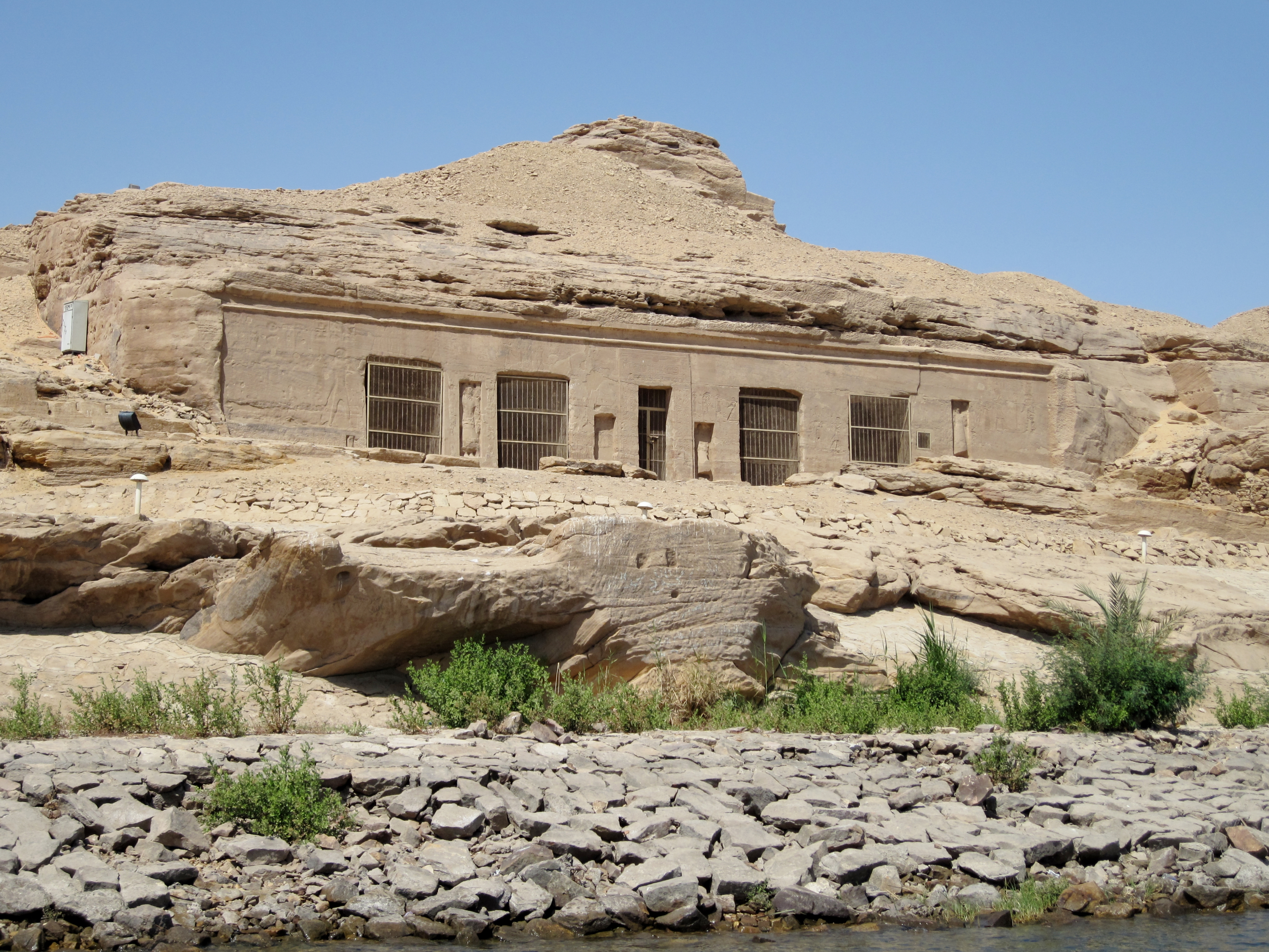 Felsentempel des Haremhab im Steinbruch Dschabal as-Silsila an der Westseite des Nil nördlich von Kom Ombo, Ägypten